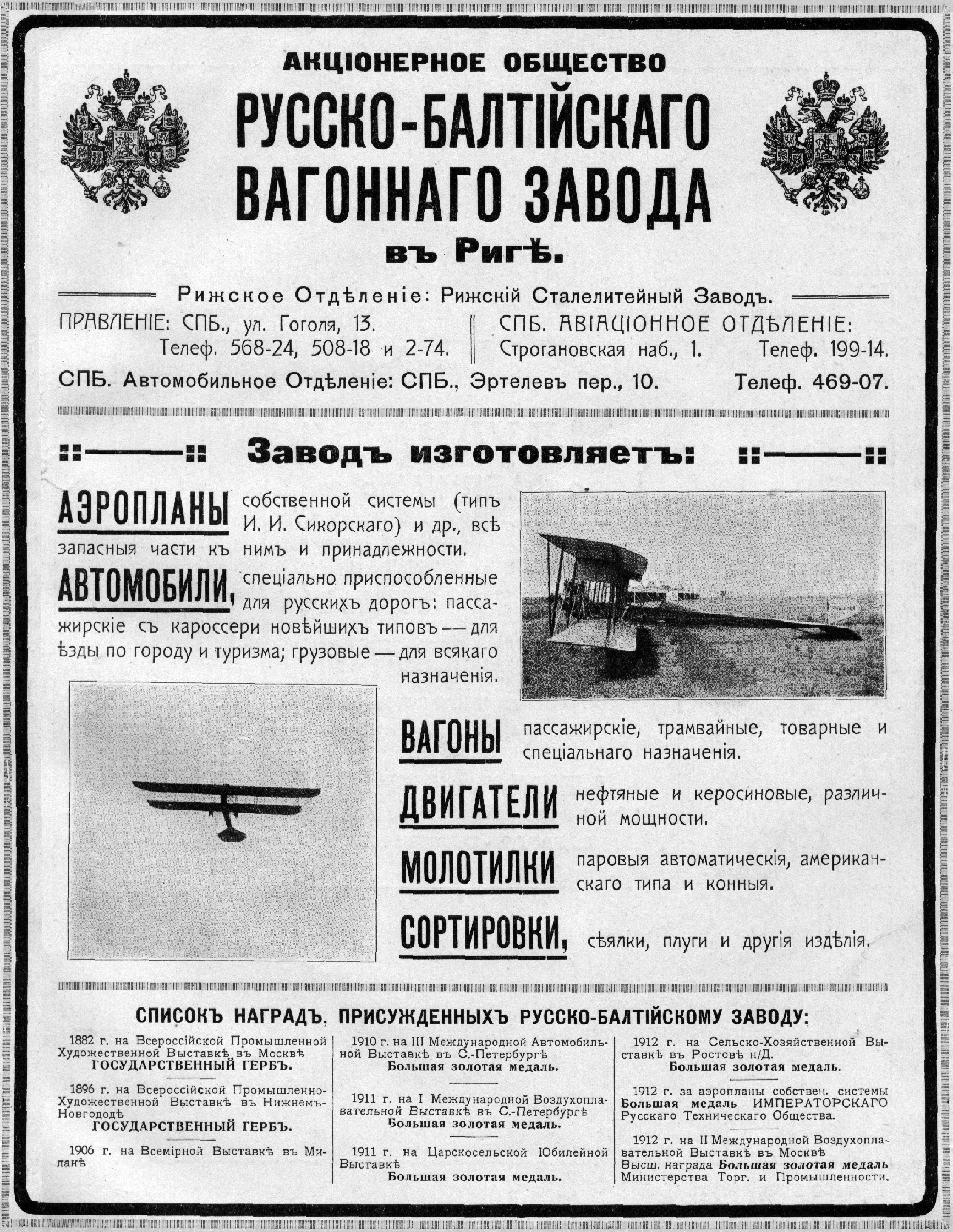 Рекламный листок Авиационного отдела Русско-Балтийского завода в Петербурге